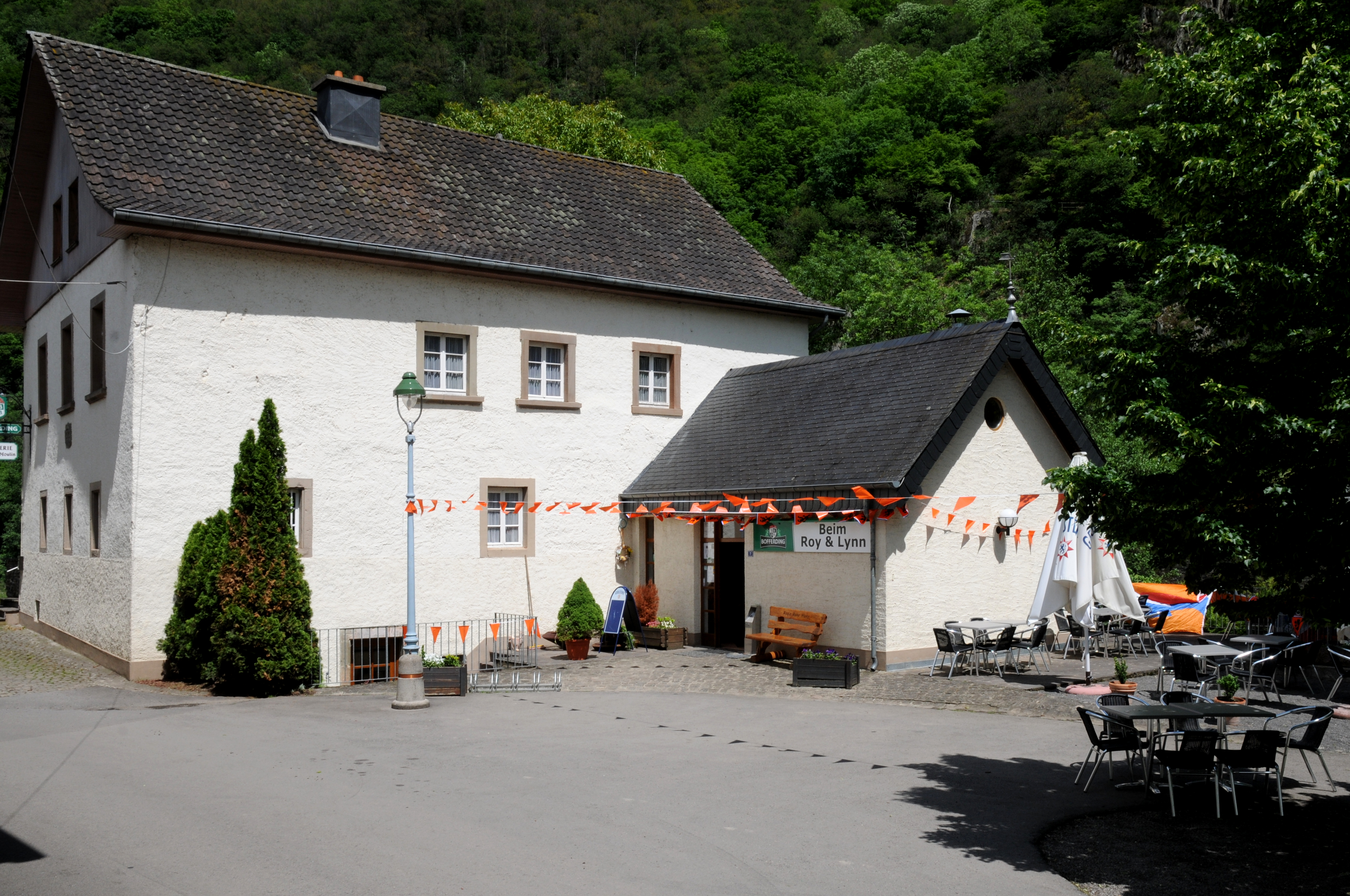 D'fréier Millen op der Buerschtermillen.